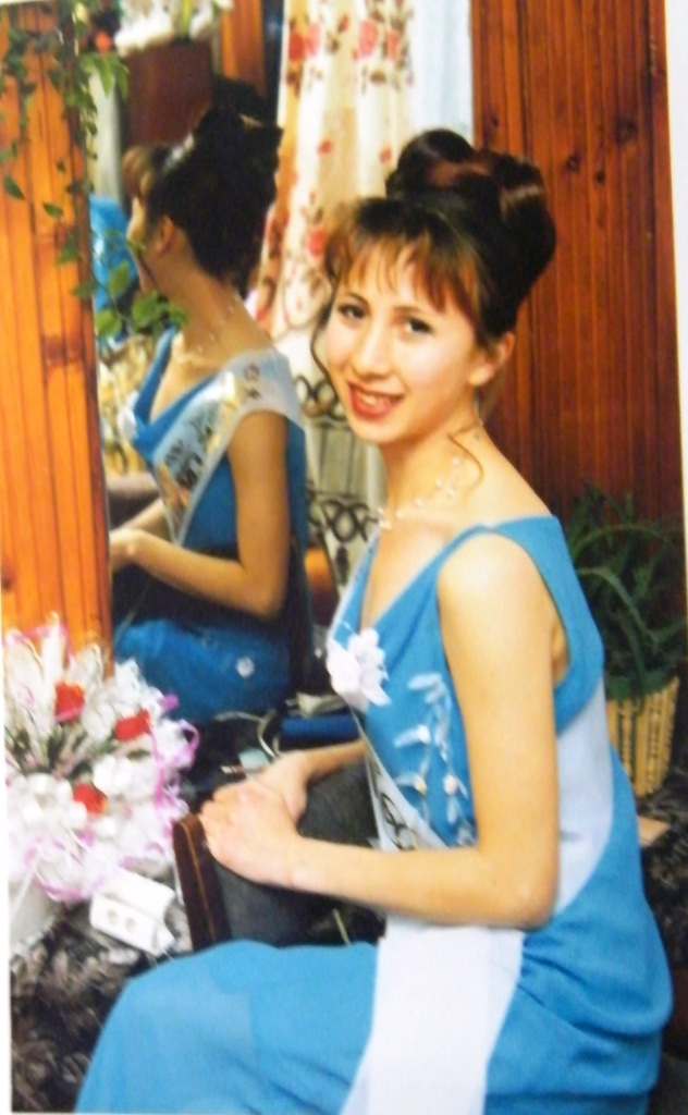 Чӑвашла: Майя, екрем, ярапайкасси, муркаш, лоцманова